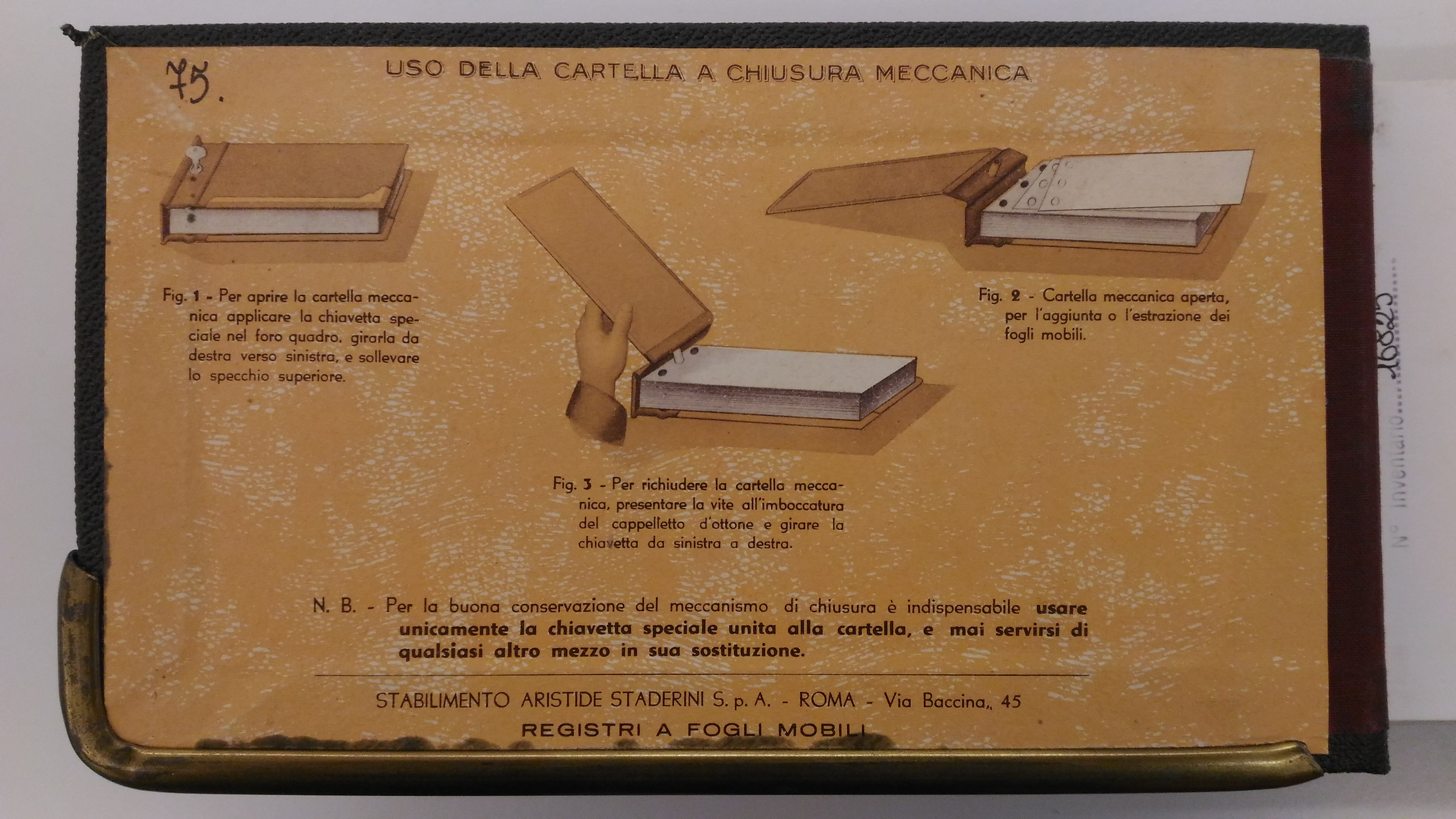 Seconda di copertina di un raccoglitore Staderini, con le spiegazioni per l'uso.